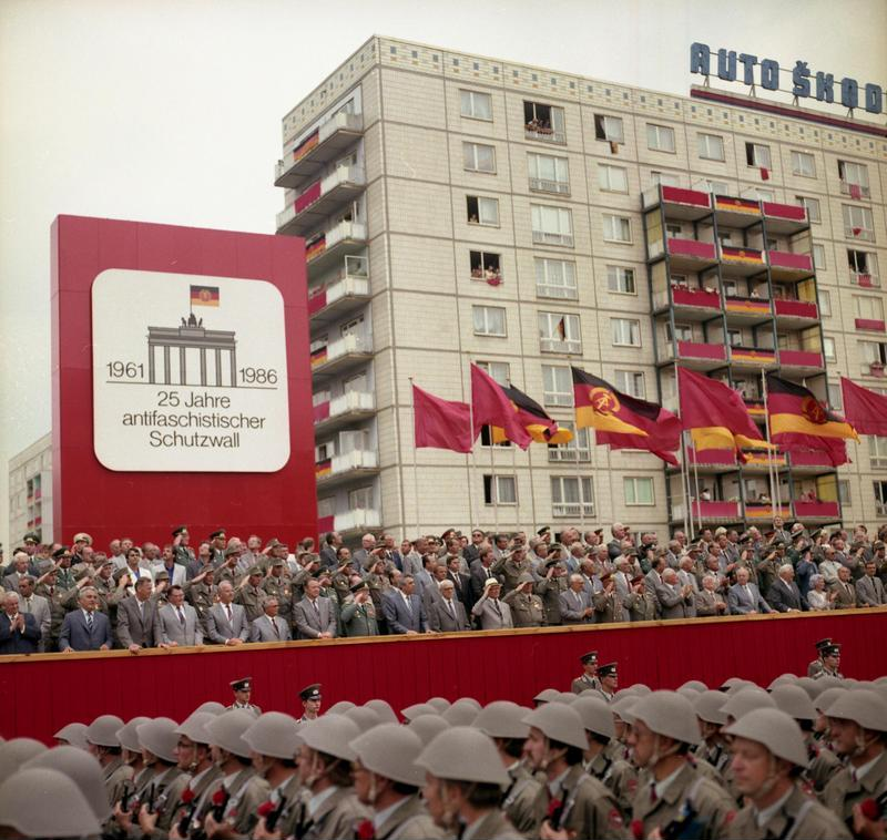 Berlin, Parade von Kampfgruppen zum Mauerbau ADN-ZB Franke 13.8.86 Berlin: Kampfappell Anläßlich des 25. Jahrestages der Errichtung des antifaschistischen Schutzwalls fand in der Karl-Marx-Allee ein Kampfappell statt, an dem Einheiten der Kampfgruppen der Arbeiterklasse, der Nationalen Volksarmee, der Grenztruppen der DDR und des Wachregiments "Feliks Dzierzynski" teilnahmen. [Berlin.- Parade von Kampfgruppen zum Bau der Mauer vor der Ehrentribüne, u.a. mit Hermann Axen, Günter Schabowski, Heinz Keßler, Egon Krenz, Willi Stoph, Erich Honecker, Margot Honecker (ganz rechts), dahinter Tafel mit Aufschrift "1961-1986 25 Jahre an] Information added by Wikimedia users.